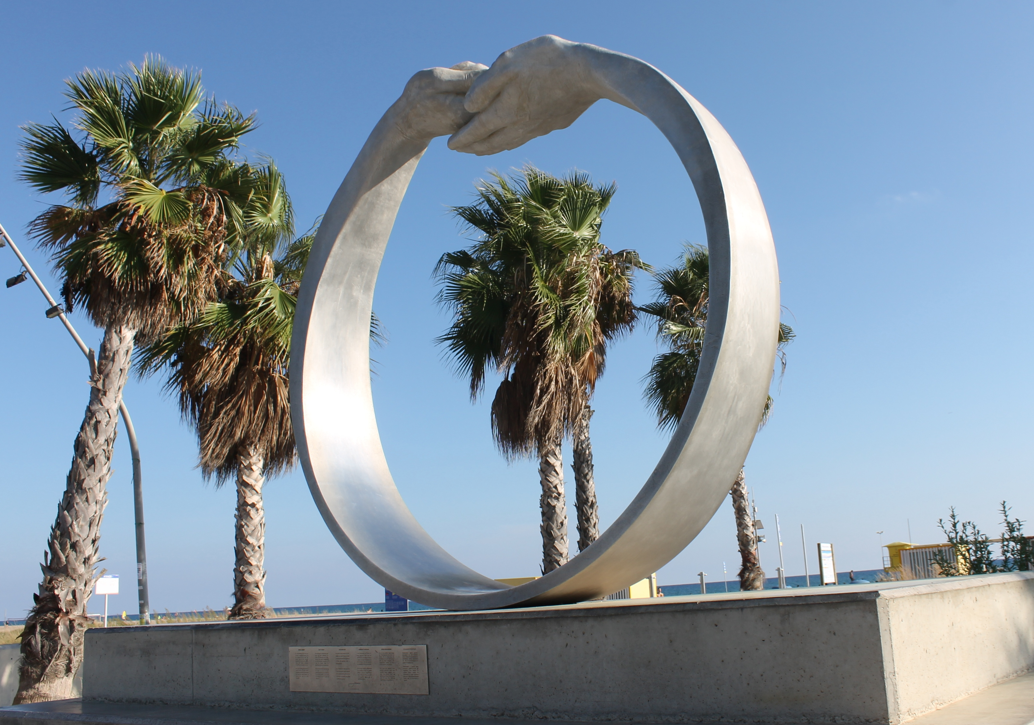 Give and Take Plastik